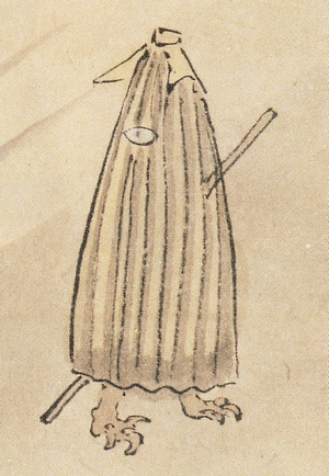 Kasa-obake (からかさ小僧, a paper umbrella monster) from the Hyakki Yagyō Zukan (百鬼夜行図巻)